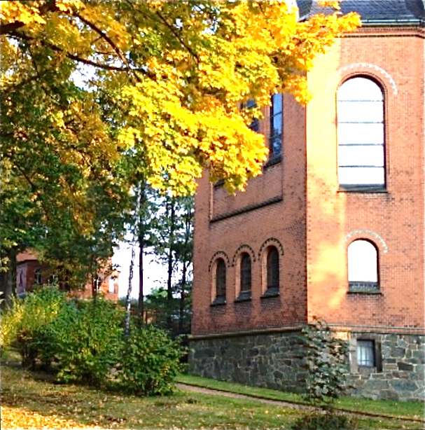 Lutherkirche Harthau, Sockel aus Harthauer Grünstein, Fotografie Dr. Benita Martin